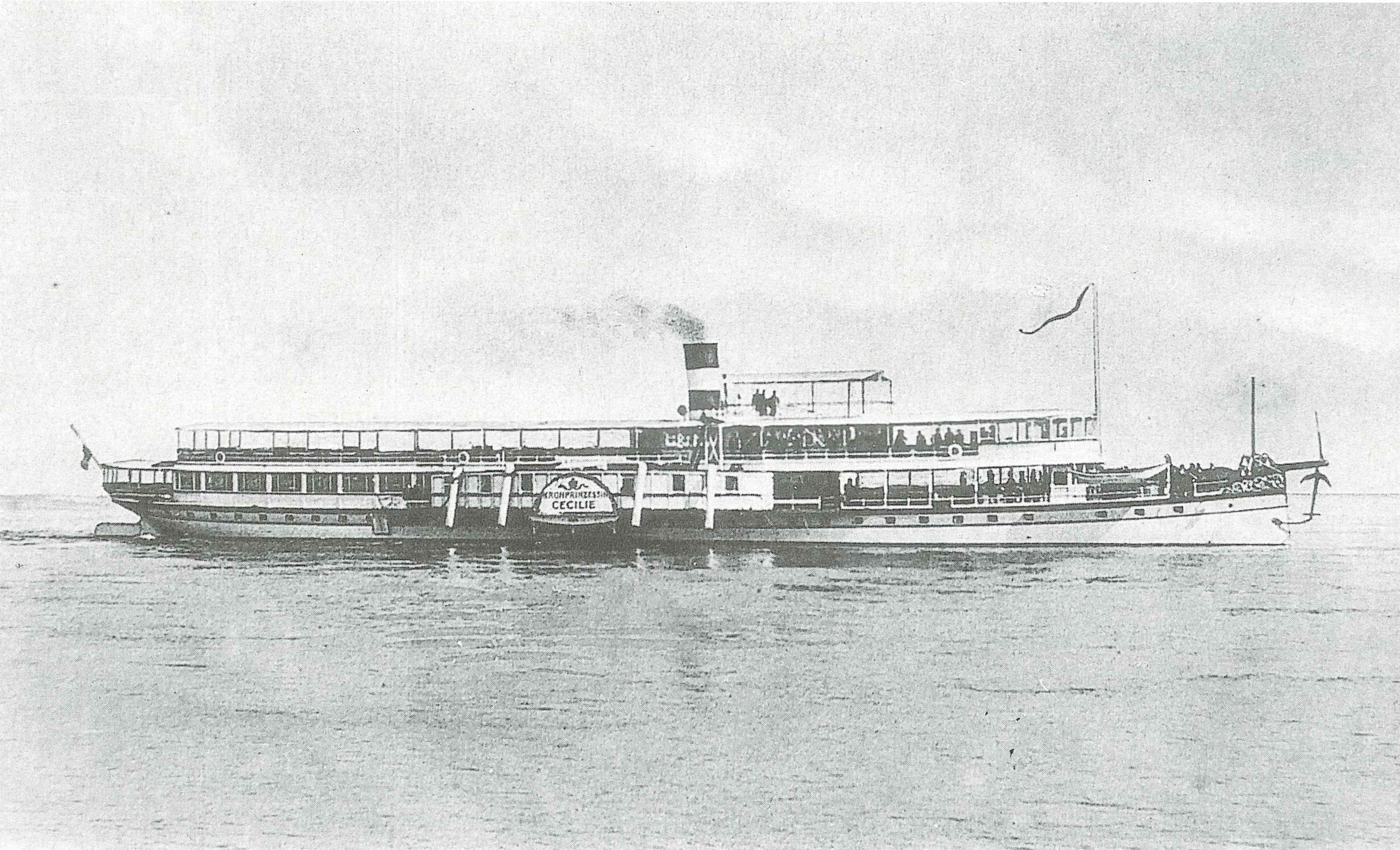 Der fabrikneue Dampfer Kronprinzessin Cecilie im Jahre 1910